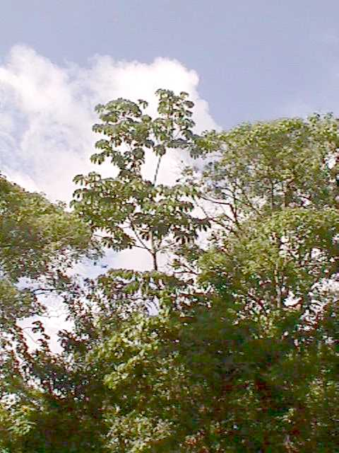 Arbol de Yagrumo (Cecropia peltata) curso alto Quebrada la Boyera